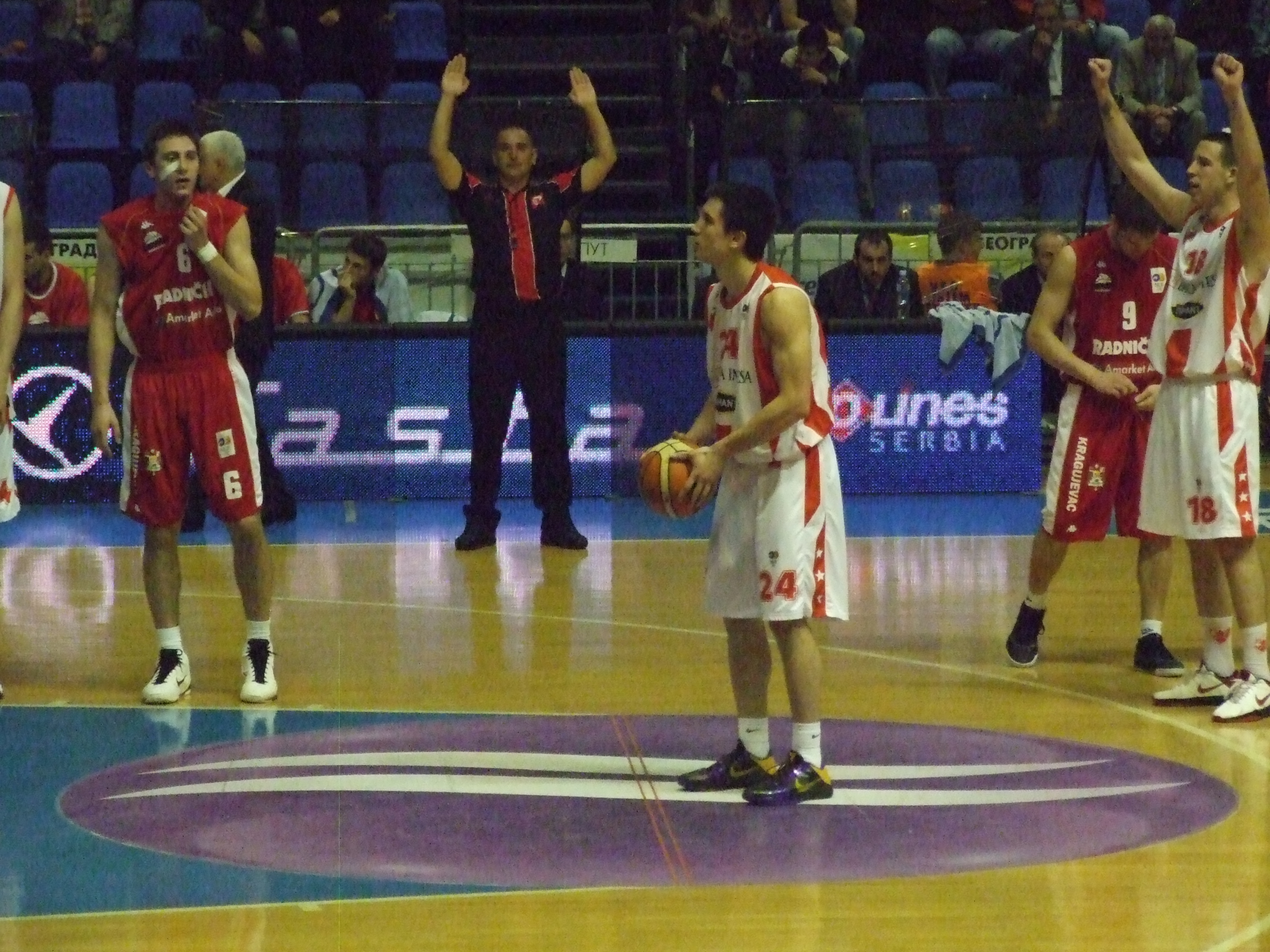 Стефан Стојачић, кошаркаш клуба Црвена Звезда. Фотографија направљена 1. маја 2010 у Пиониру на кошаркашкој утакмици између Црвене Звезде и Радничког из Крагујева.